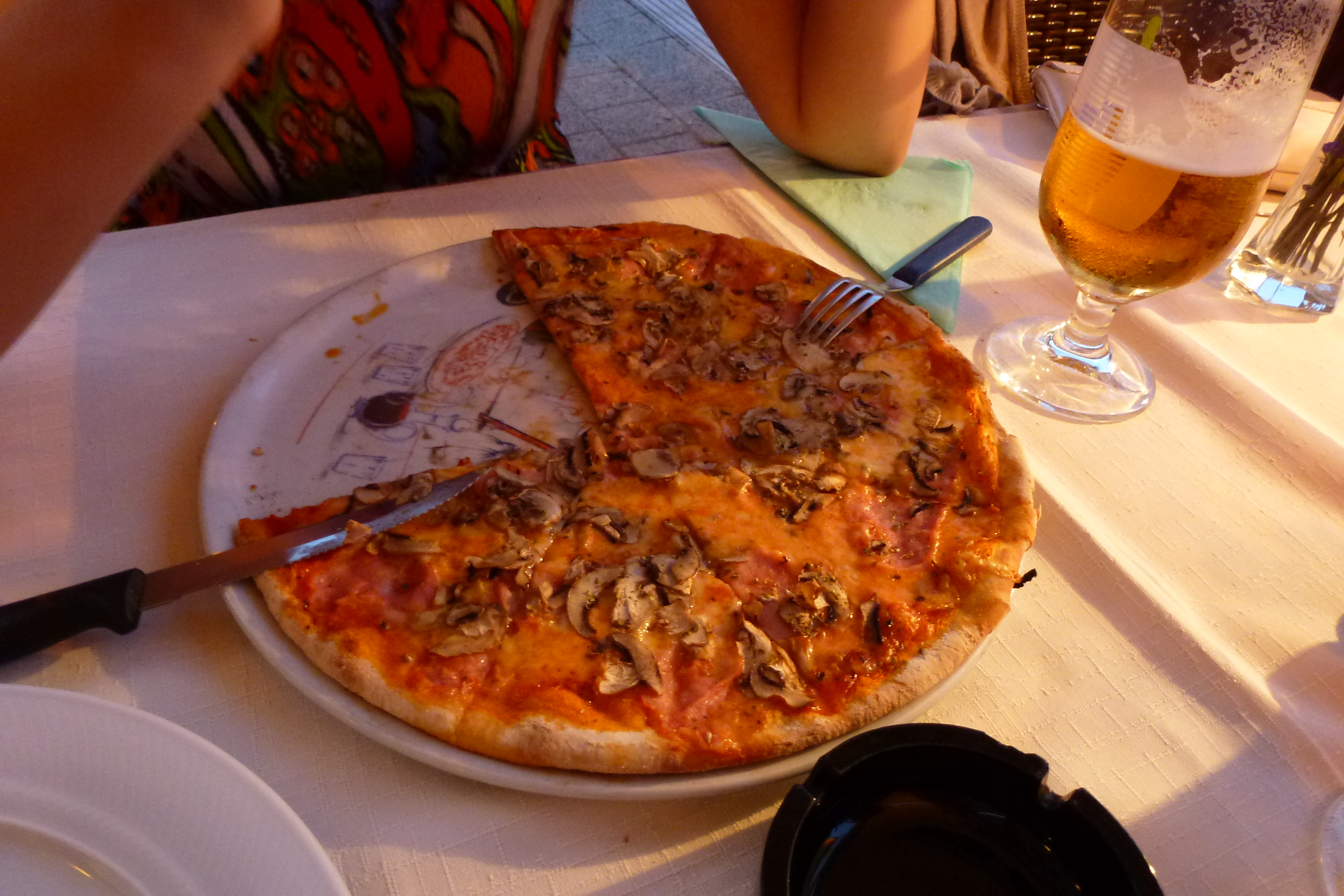 Pizza Capricosa in restaurant Spalato in Vodice